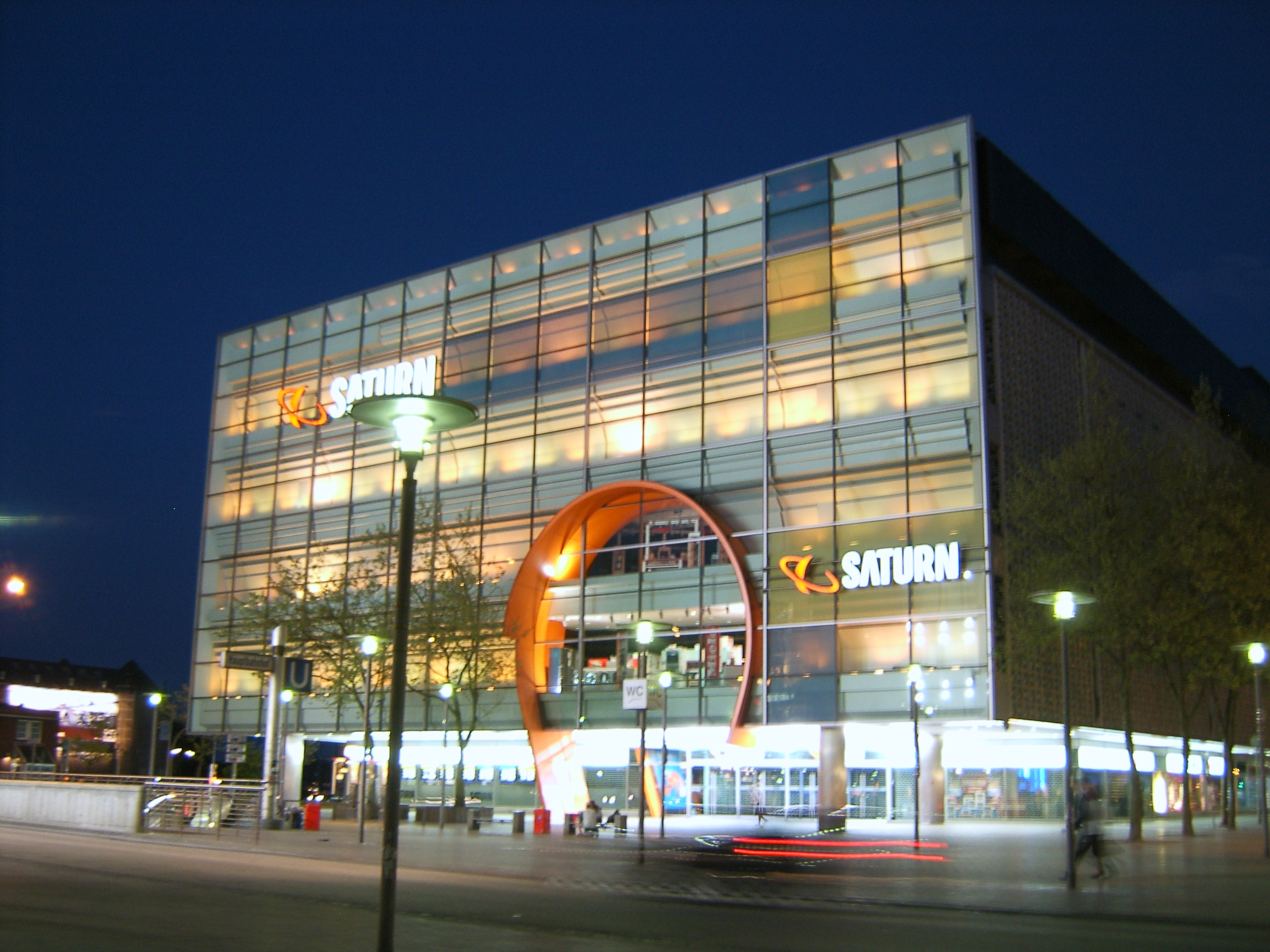 Das Technikkaufhaus Saturn ist im ehemaligen Hortenhaus, 1967 bis 1969 nach Entwürfen von Fischer und von Bassewitz errichtet, untergebracht. Bis zur Zerstörung im Zweiten Weltkrieg stand hier das Hamburger Naturgeschichtliche Museum (1886 bis 1888 erbaut).